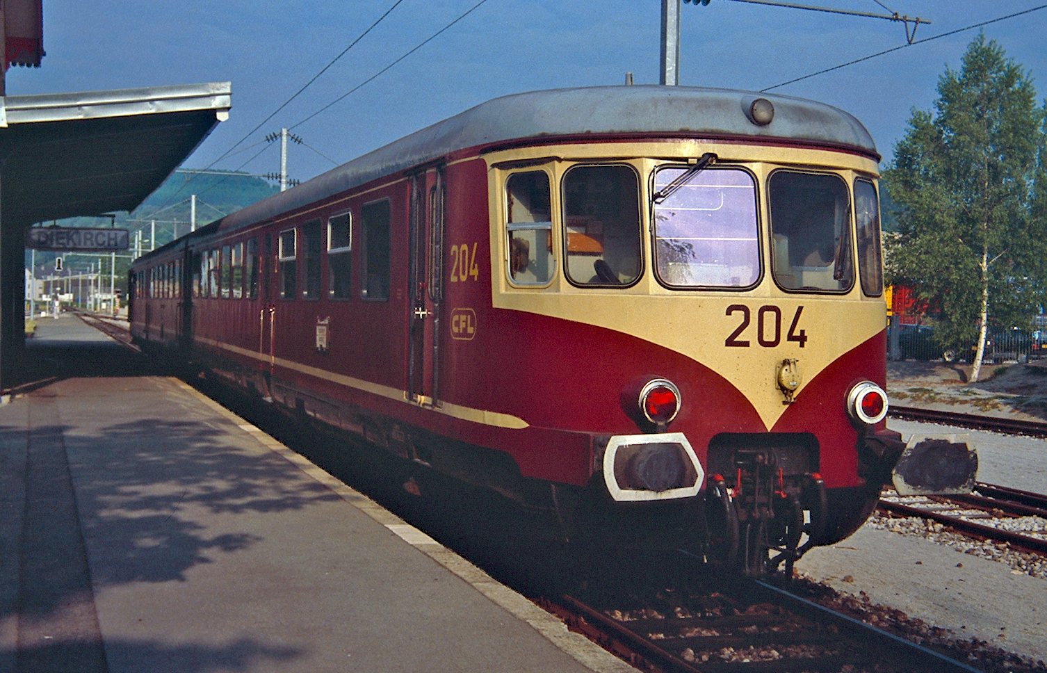 Westwaggon Triebwagen 204 in Diekirch